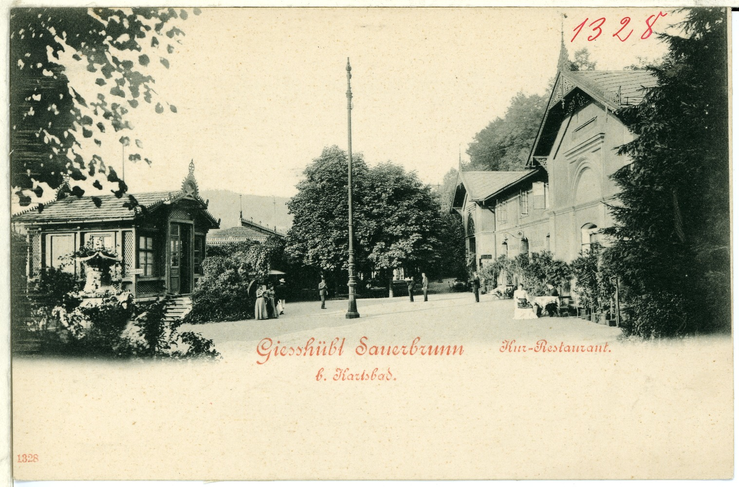 Gießhübl-Sauerbrunn; Kur-Restaurant This postcard is from publisher Brück & Sohn in Meißen ( This postcard has a unique number 01328 and is available in a higher resolution at the publisher. This images was uploaded in a cooperation project between Wikipedians and the publisher.